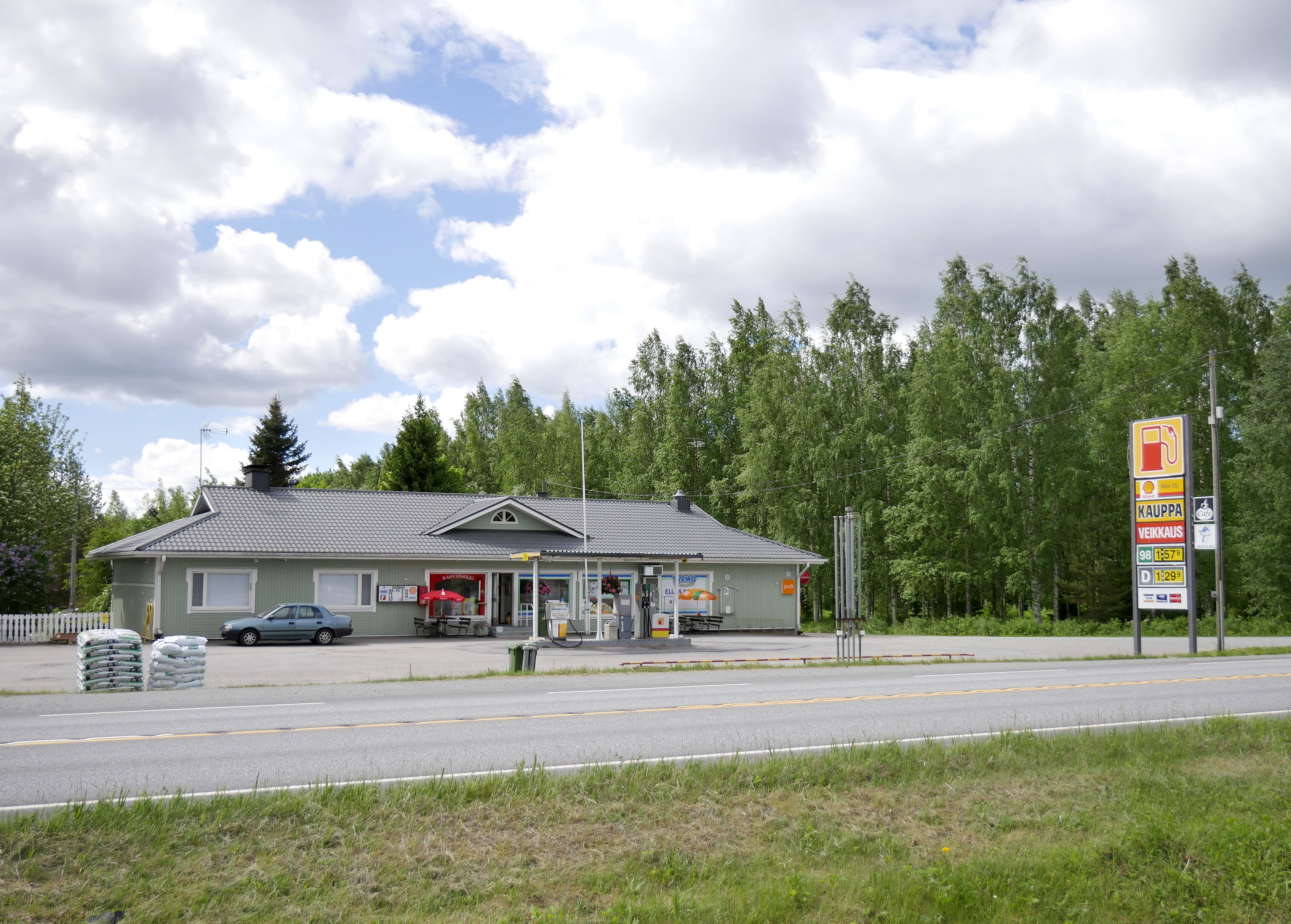 Tarmo Ellan kauppa -kyläkauppa Lapuan Kauhajärven kylässä.